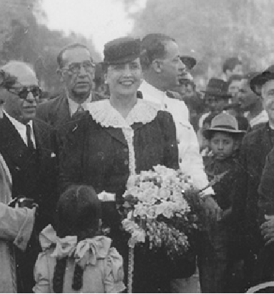 Visita de Enriqueta Garland de Prado a Piura durante la Guerra del 41